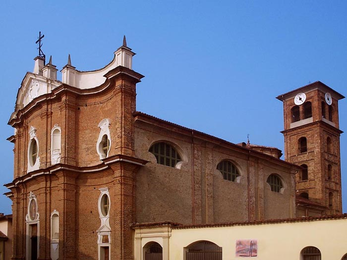 Chiesa parrocchiale di Piscina opera di Gerolamo Buniva (1766)